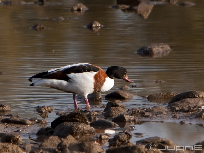 Tarro blanco, (Todorna todorna.)